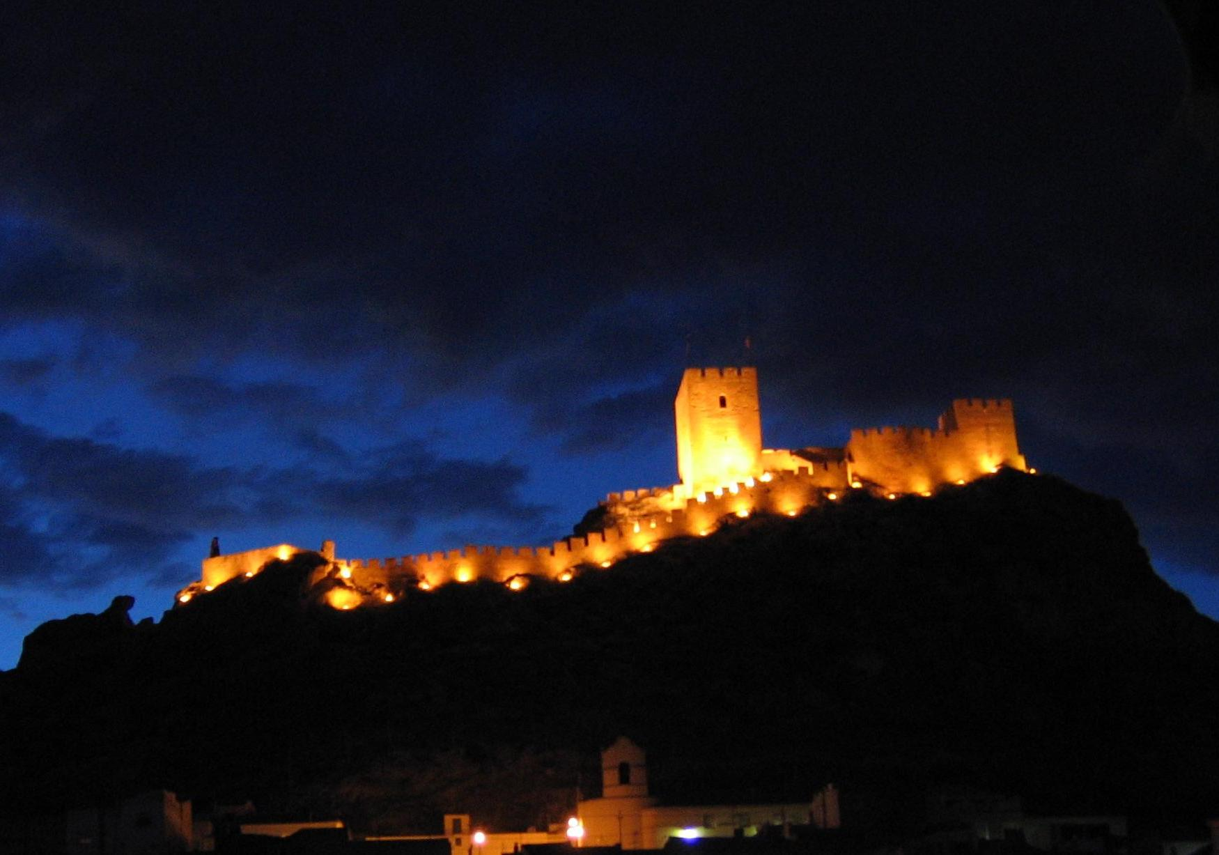 Immagen panorámica del Castillo de Sax iluminado en la noche.